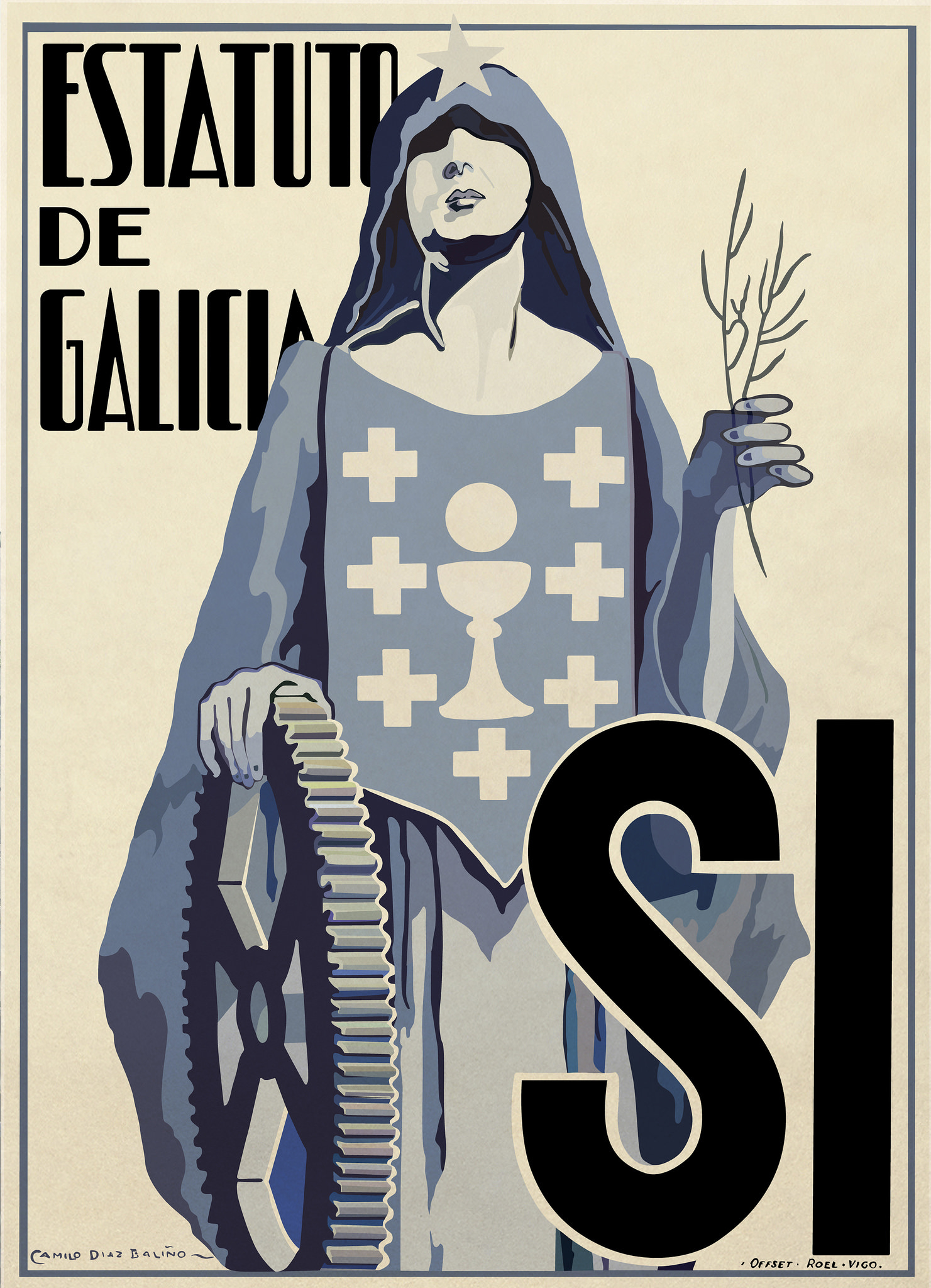 Cartel promocional del Estatuto de Galicia de 1936